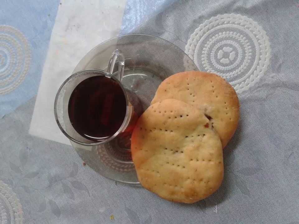 كحك(قرص او قراقيش ) بالشاي This is an image of food from Egypt